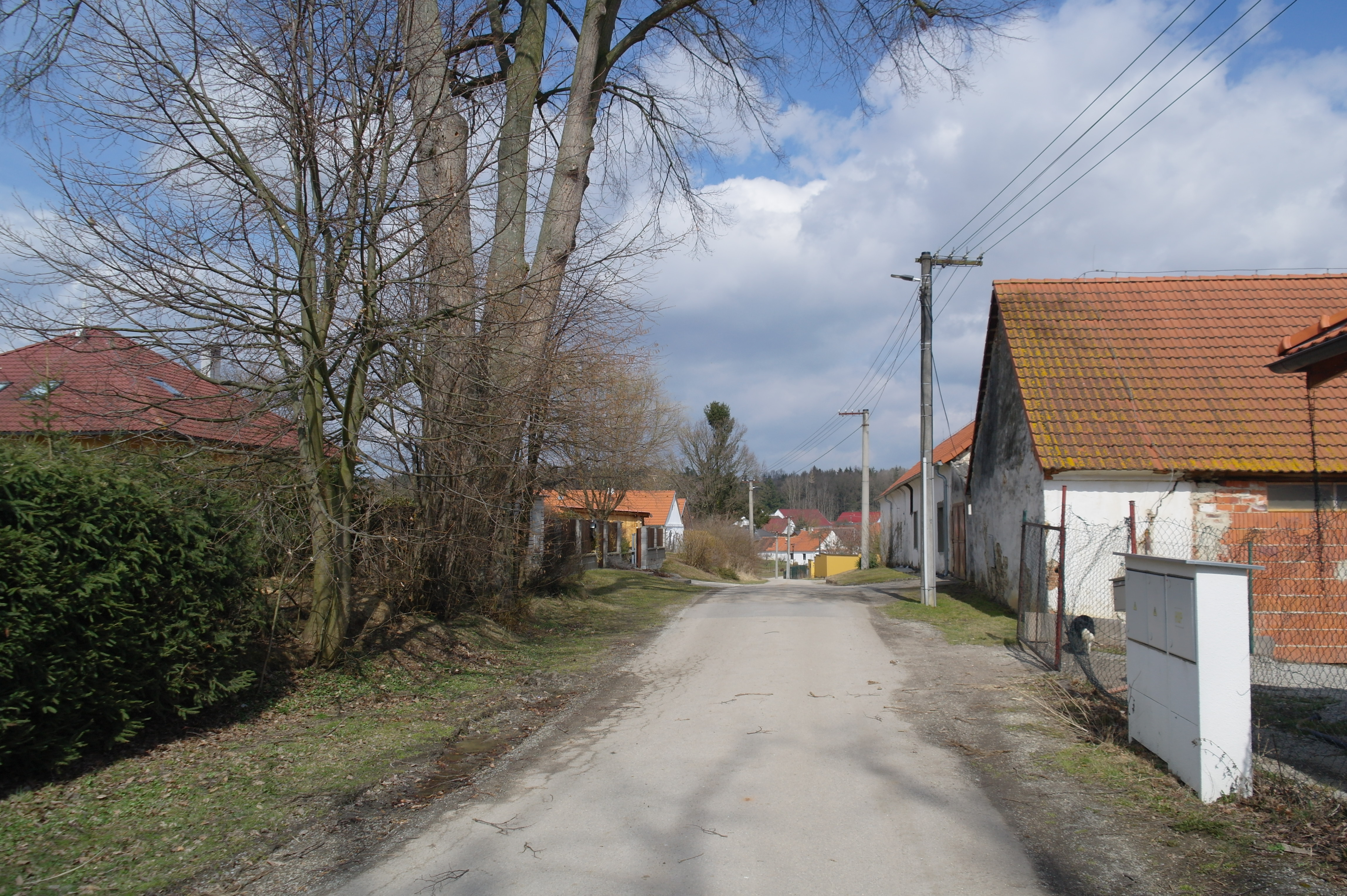 Hvozdec, ulice ve východní části vesnice